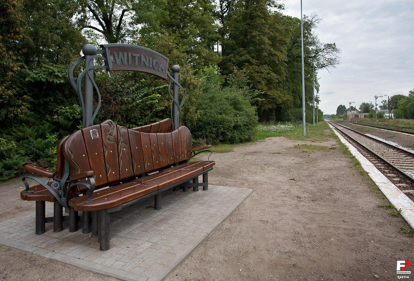 Ławka dla podróżnych, oczekujących na pociąg. Meble w tym stylu - metal pogięty i grube deski bejcowane - ławki, a widziałam i stół, są rozmieszczone w kilku miejscach w centrum Witnicy. Zapewne ten styl znajdzie tylu zwolenników, co przeciwników:).